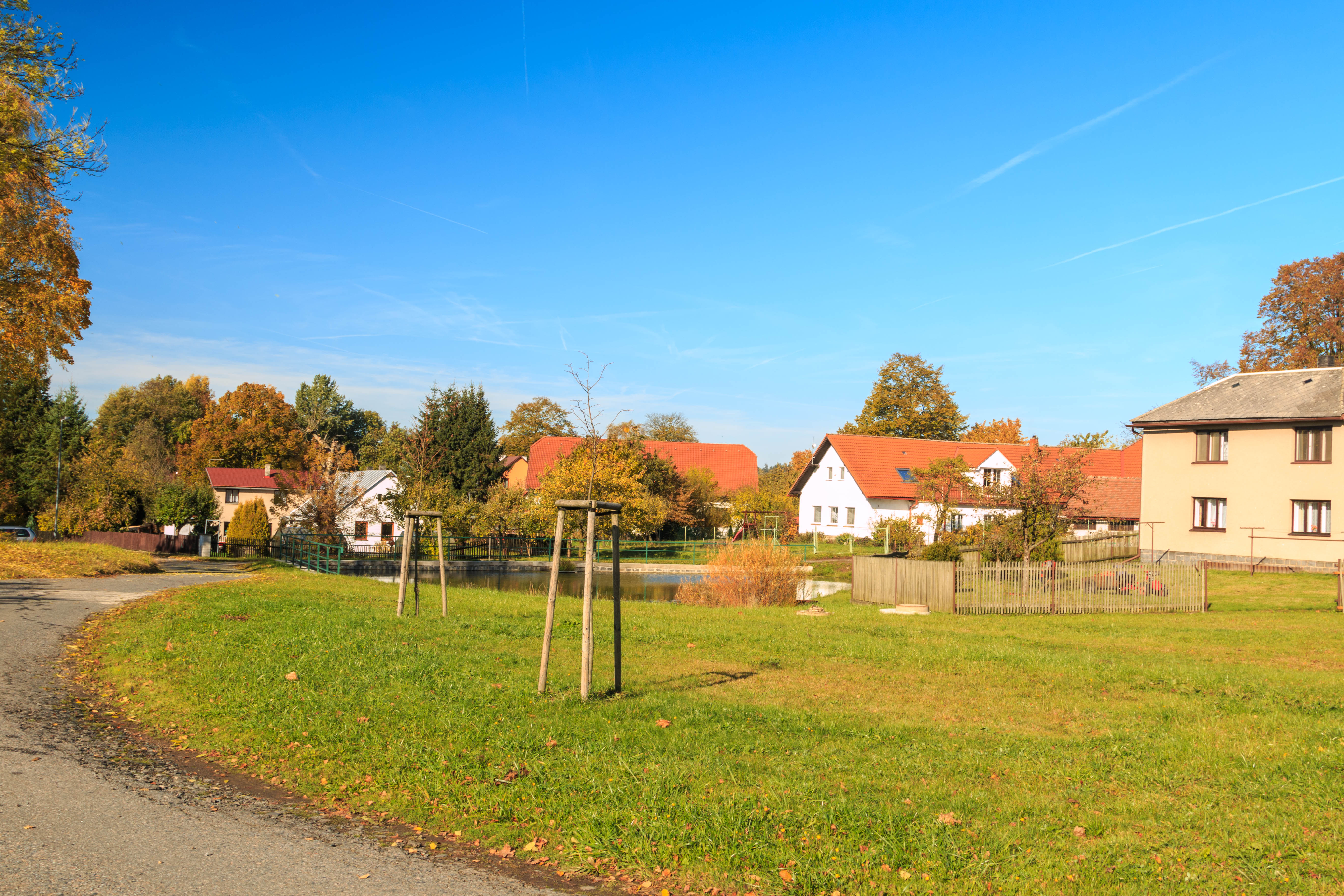 Rovný rybníček